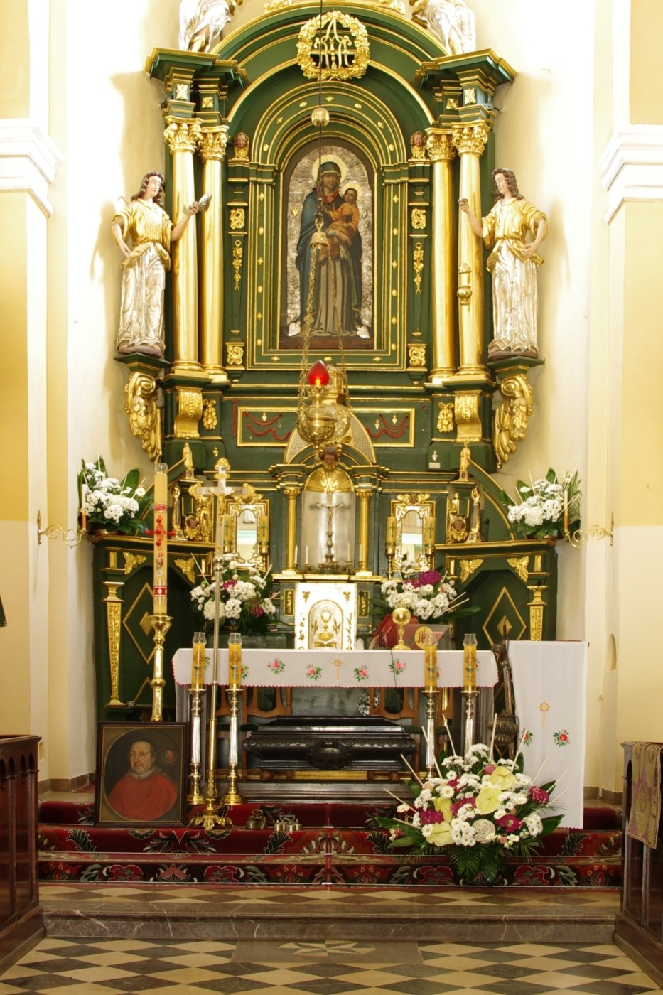 Kościół pw. św. Wojciecha- ołtarz